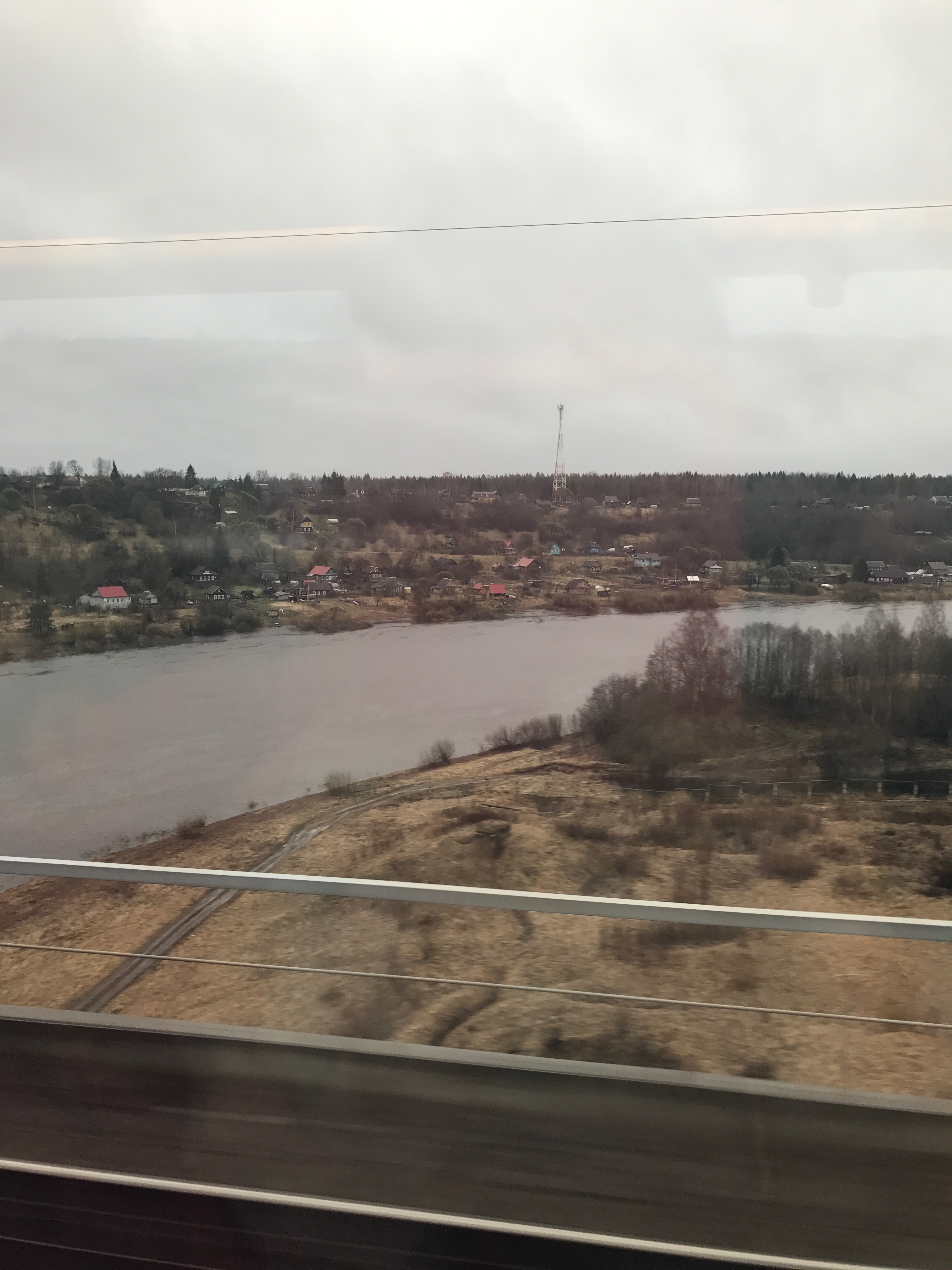 Река Мста